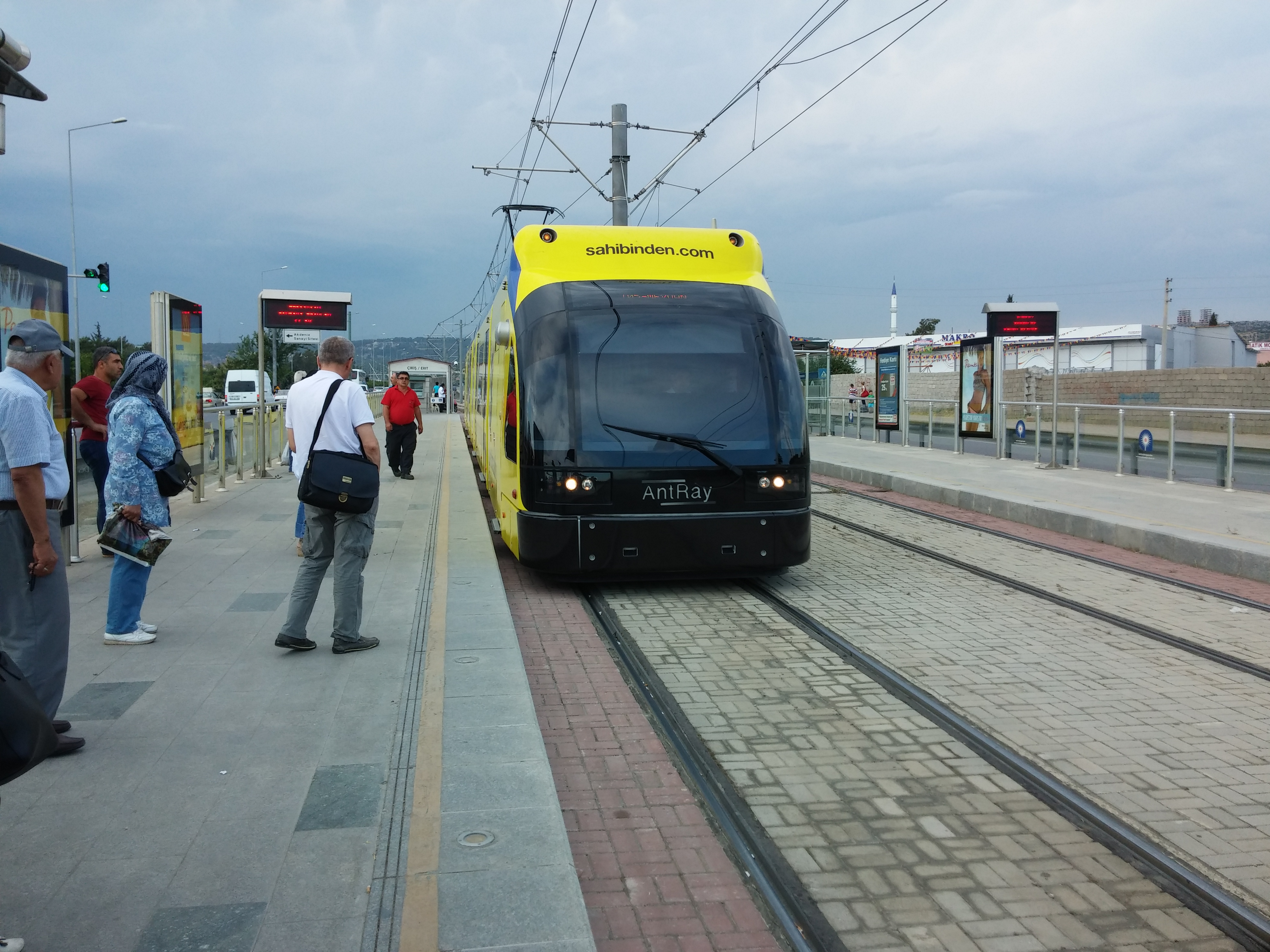 Antalya'da kullanılmakta olan AntRay sistemine dahil olan bir tramvayın Ferrokrom durağında çekilmiş bir fotoğrafı.